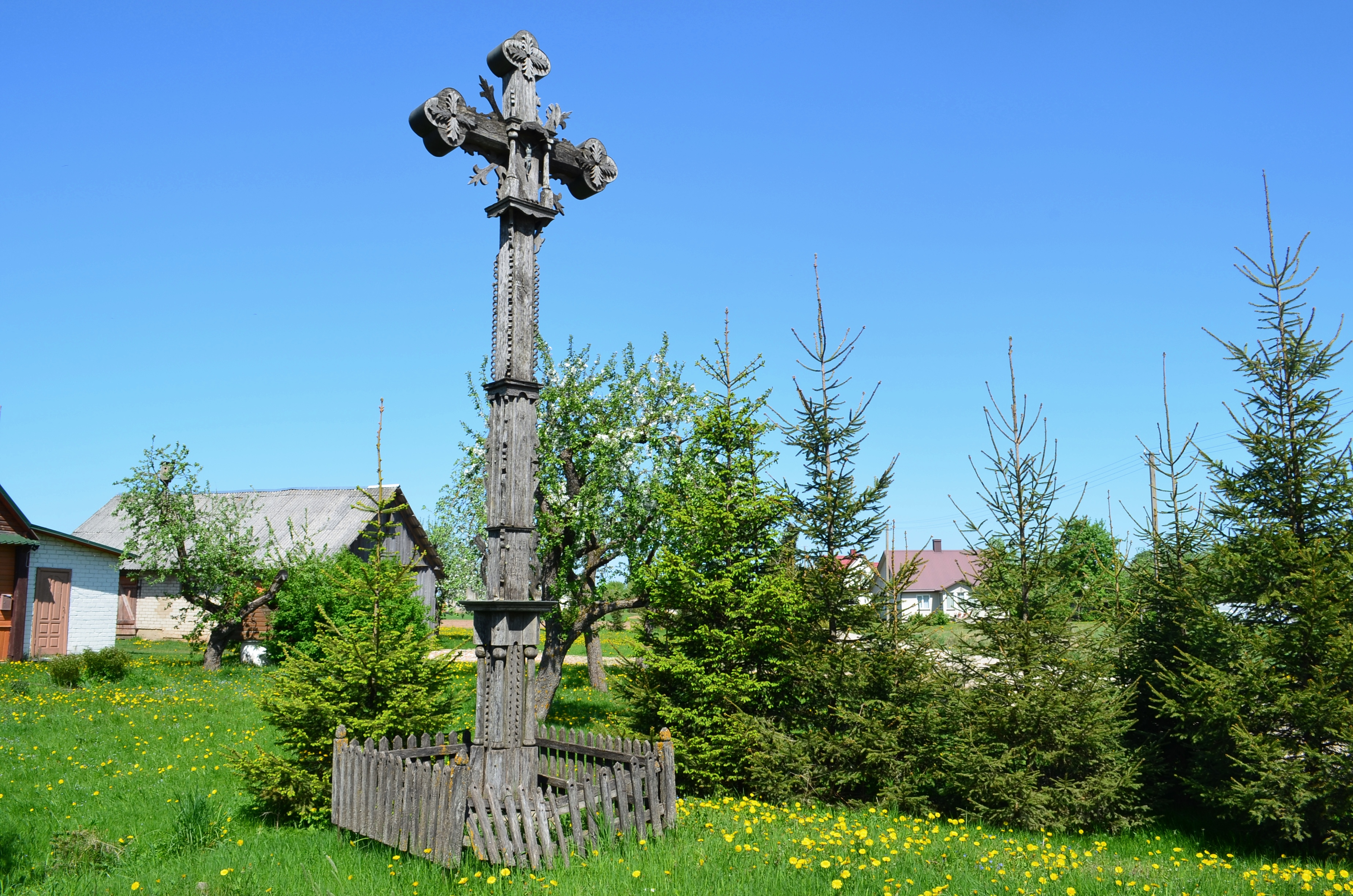 Kryžius, Maželiai, Kavarsko sen., Anykščių raj.